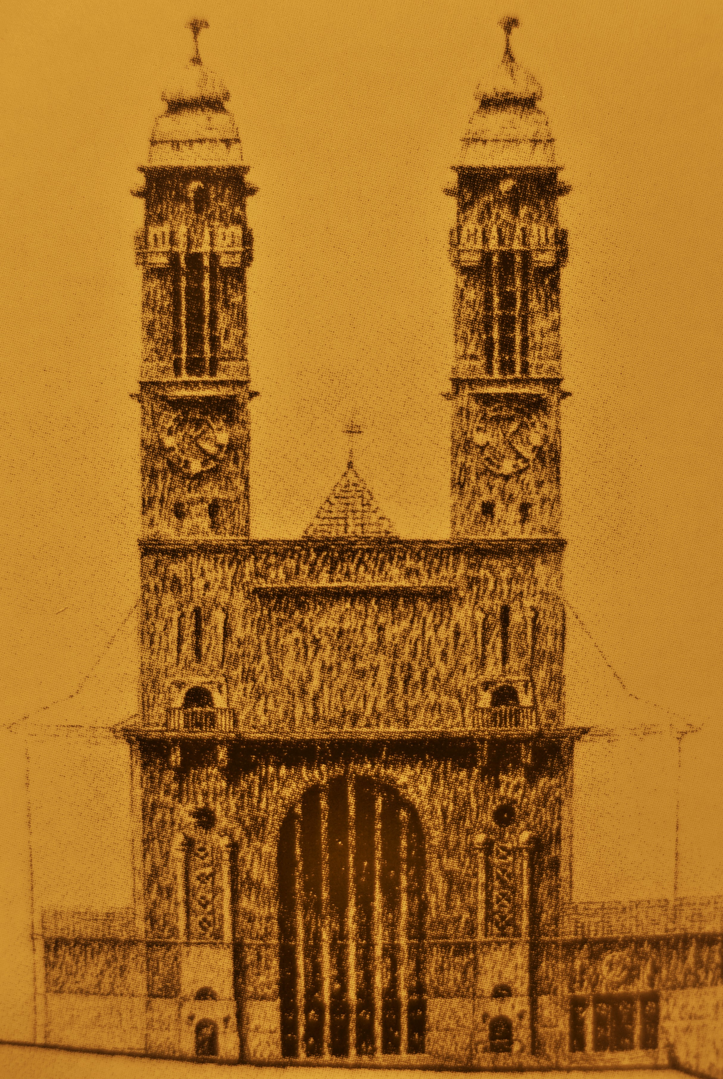 St. Michael, Saarbrücken, Fassadenskizze von 1913/18 mit ursprünglich barockisierenden Turmhauben (Archiv Institut für aktuelle Kunst im Saarland)